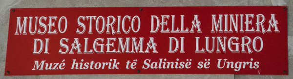 Tabella estrena bilingue Museo Storico della Miniera di Salgemma di Lungro